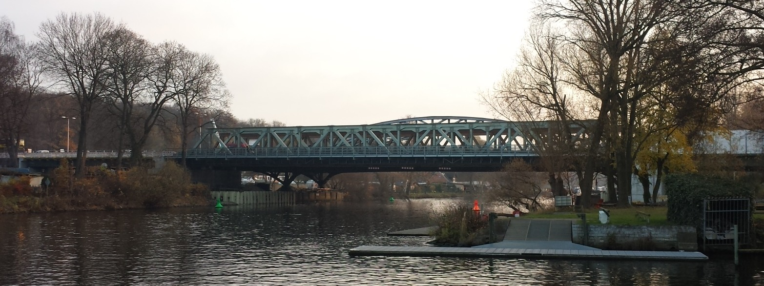 Behelfsbrücken der Freybrücke mit Freybrücke im Hintergrund. Sicht von Norden, Mitte November 2014